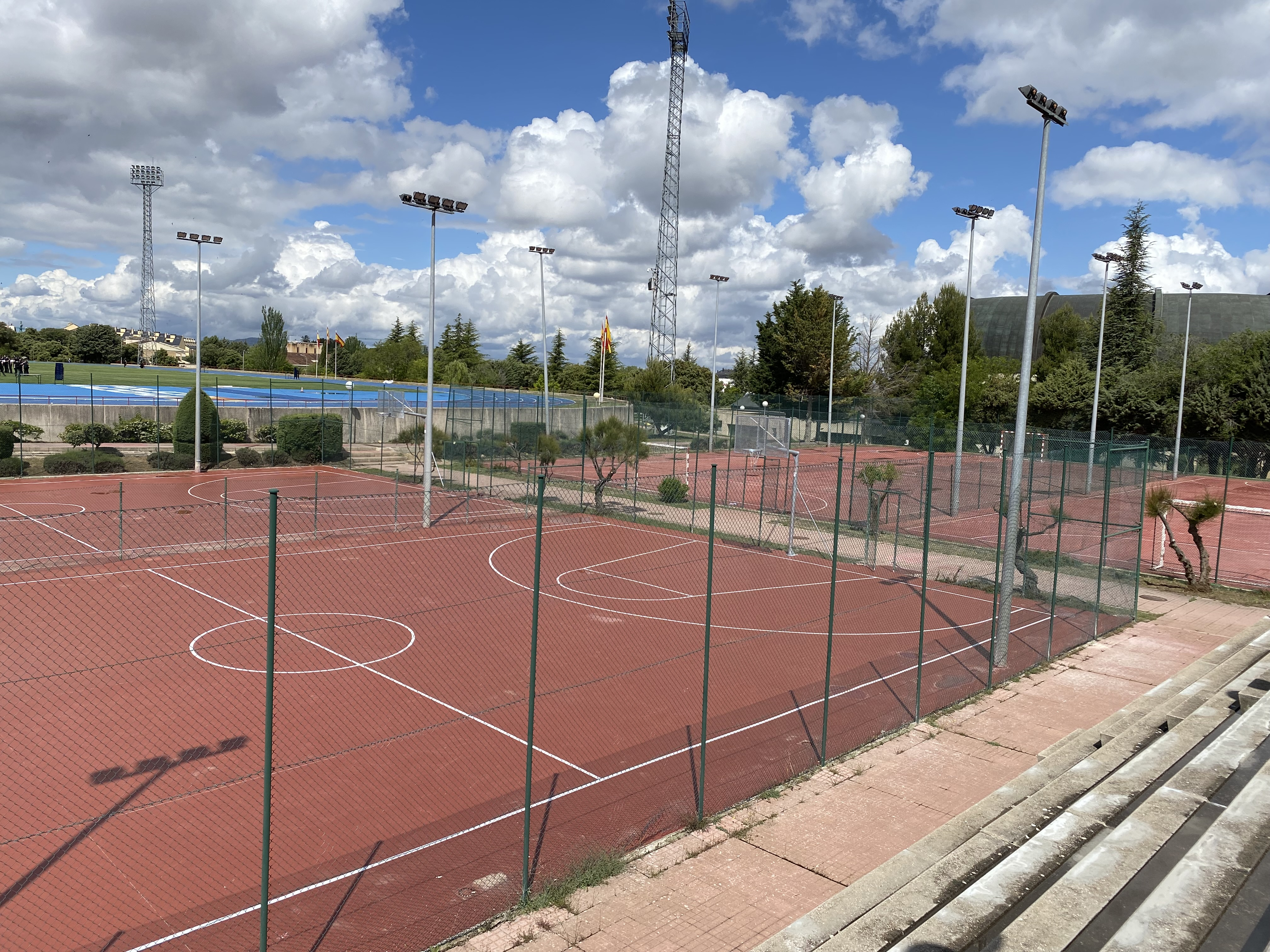 pistas baloncesto y futbito polideportivo exterior